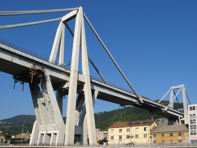 Genova, viadotto Polcevera. La pila 9 crollata il 14 agosto 2018.